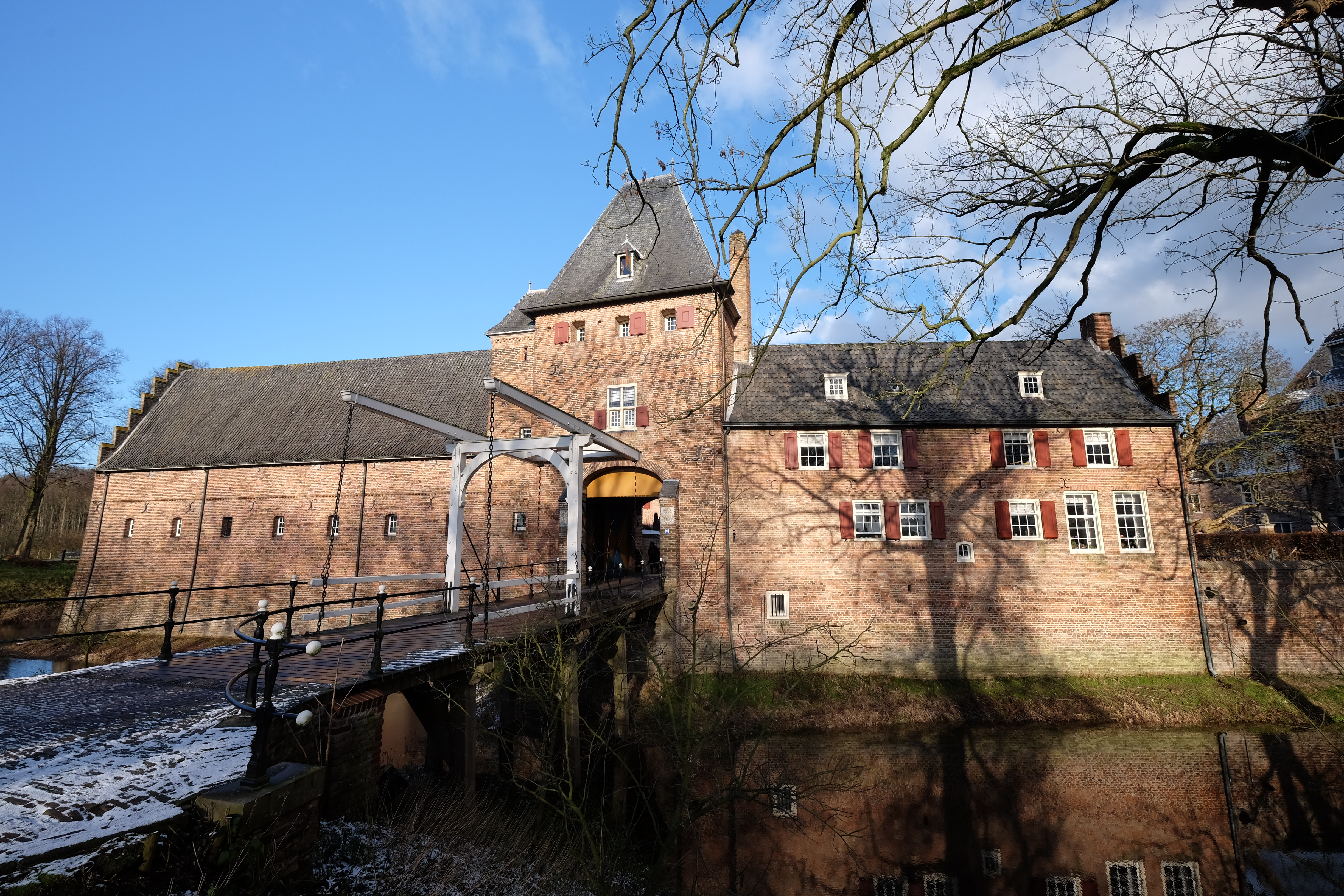 6866 Heelsum, Netherlands